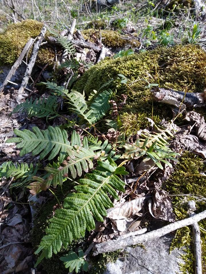 Polypodium vulgare или слатка папрат је честа у шумама и припада фамилији Polypodiaceae. Ризом се користи као лековит, и он је сладког укуса по чему је и биљка добила име.